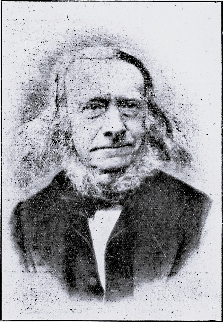 Lichtbildportrait von de: Carl Julius Milde